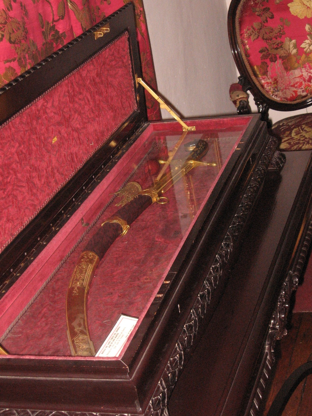 Réplica del Sable Corvo del general Don José de San Martín.